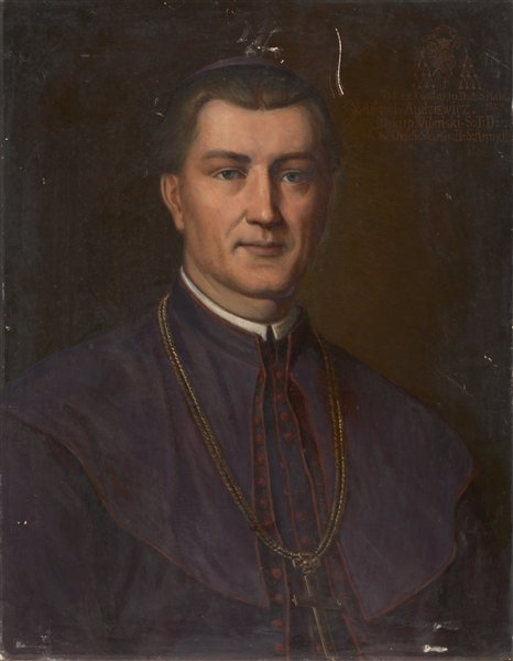 Беларуская (тарашкевіца): Антоні Францішак Аўдзевіч